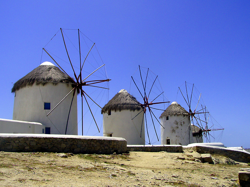 Windmills at Mykonos Island